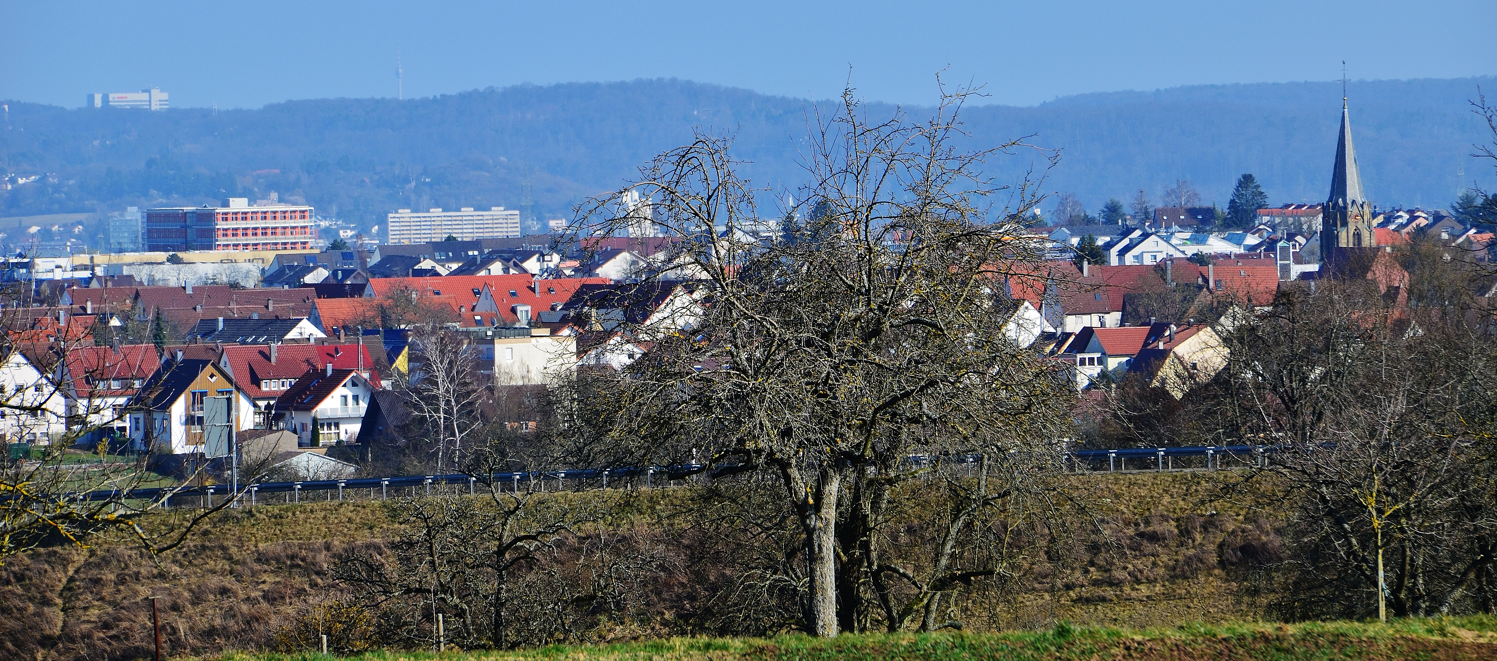 Rutesheim